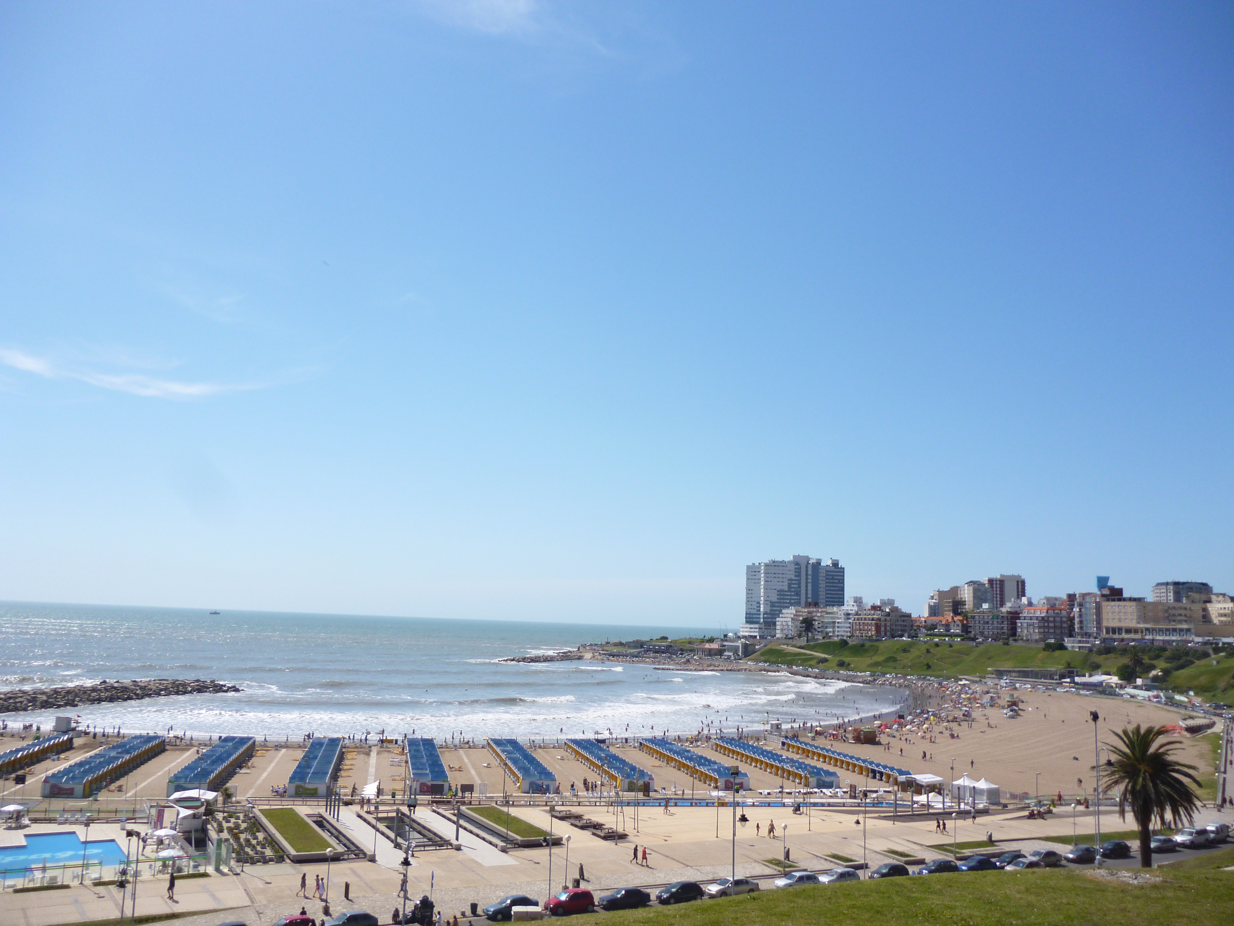 El Cabo Corrientes visto desde Playa Varese